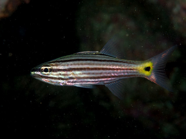 スダレヤライイシモチ Cheilodipterus intermedius